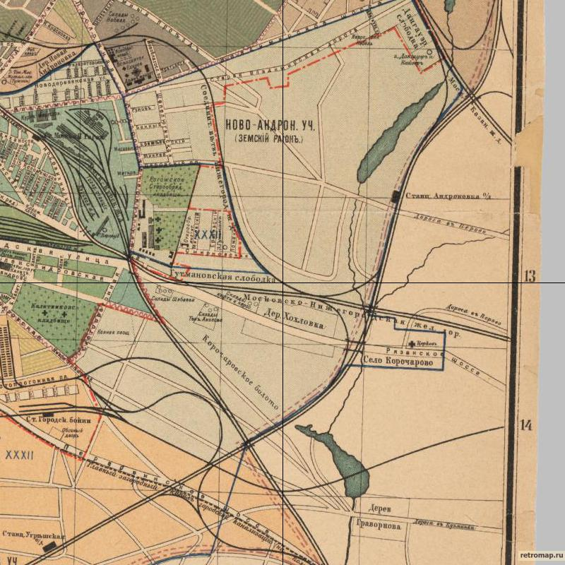 Фрагмент плана города Москвы с пригородами издание т-ва С.С. Суворина «Новое время» 1915 г. с деревней Хохловка